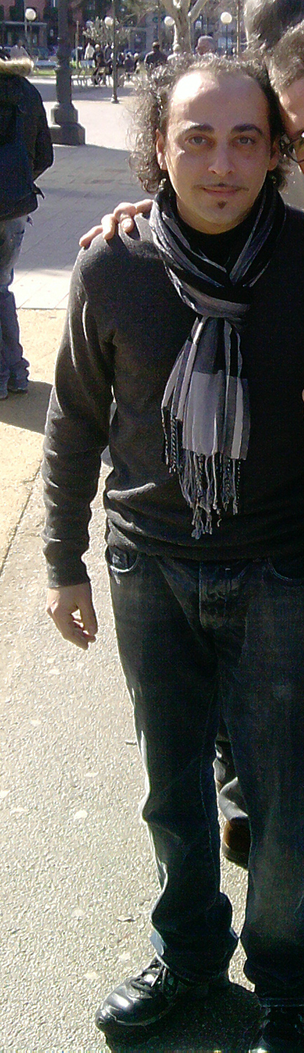 Lello Musella a Castellammare di Stabia